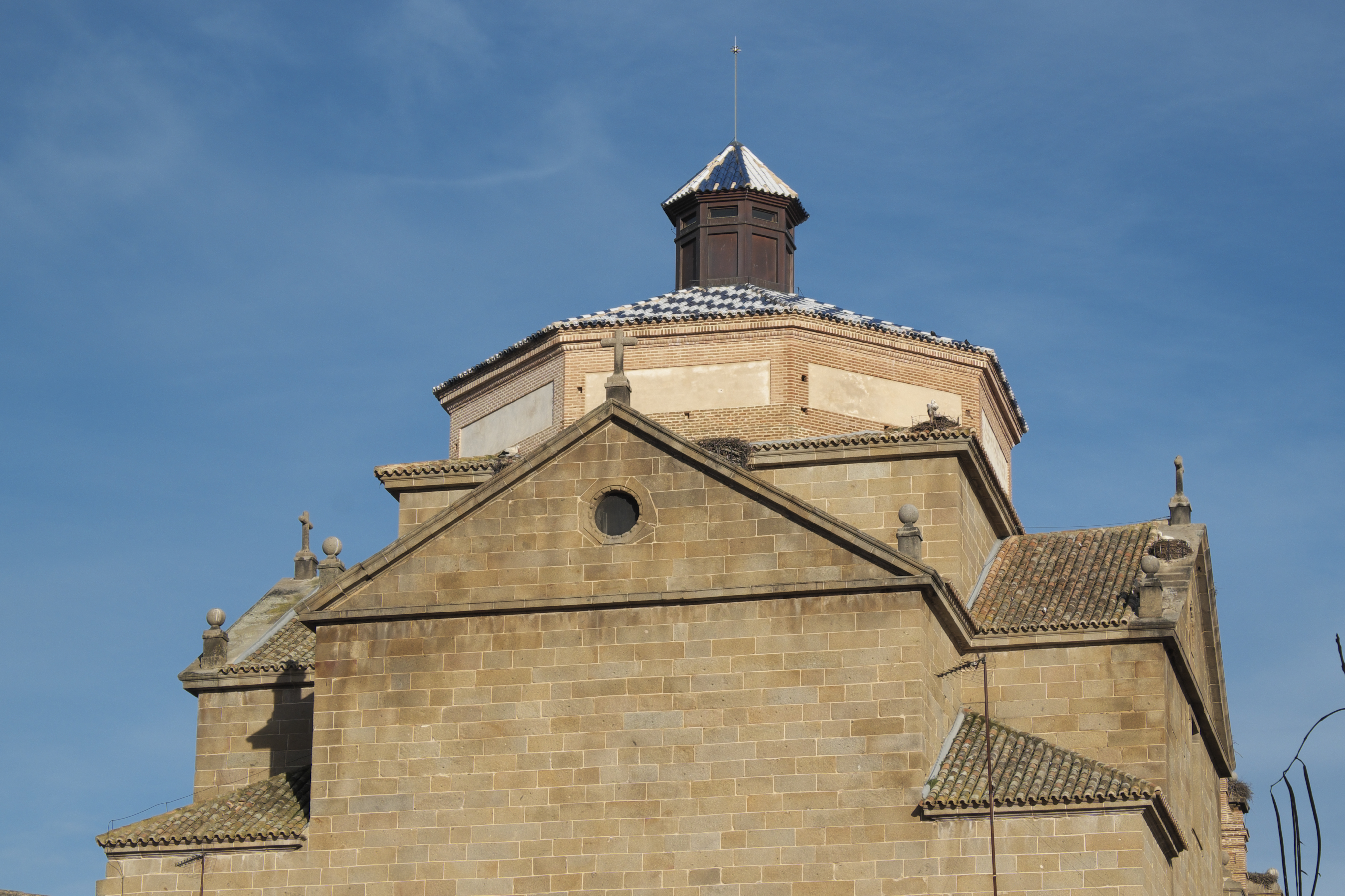 Kirche in Oropesa in der Provinz Toledo (Kastilien-La Mancha/Spanien)